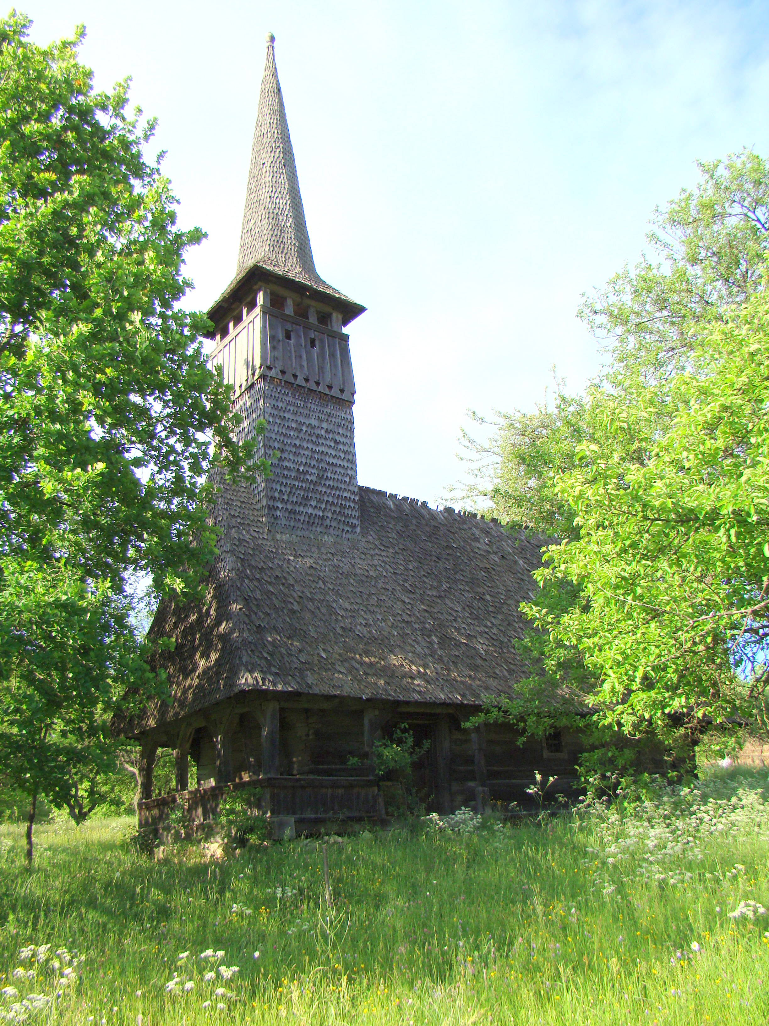 Biserica de lemn din Frîncenii Boiului